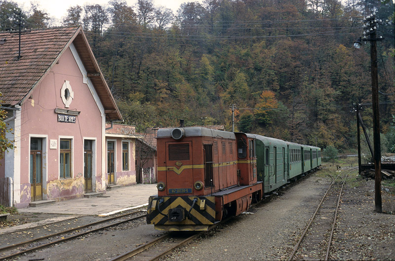 Gara Baia de Arieș de pe traseul mocăniței Turda-Abrud 06